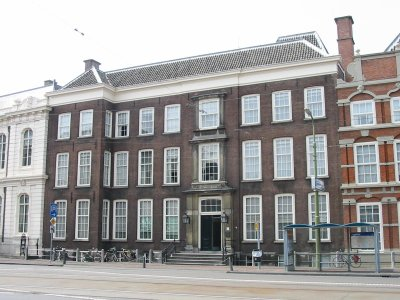 Gebouw van de Raad van State aan de Kneuterdijk in Den Haag. foto gemaakt en ter beschikking gesteld voor vrij gebruik door Gebruiker:Ellywa